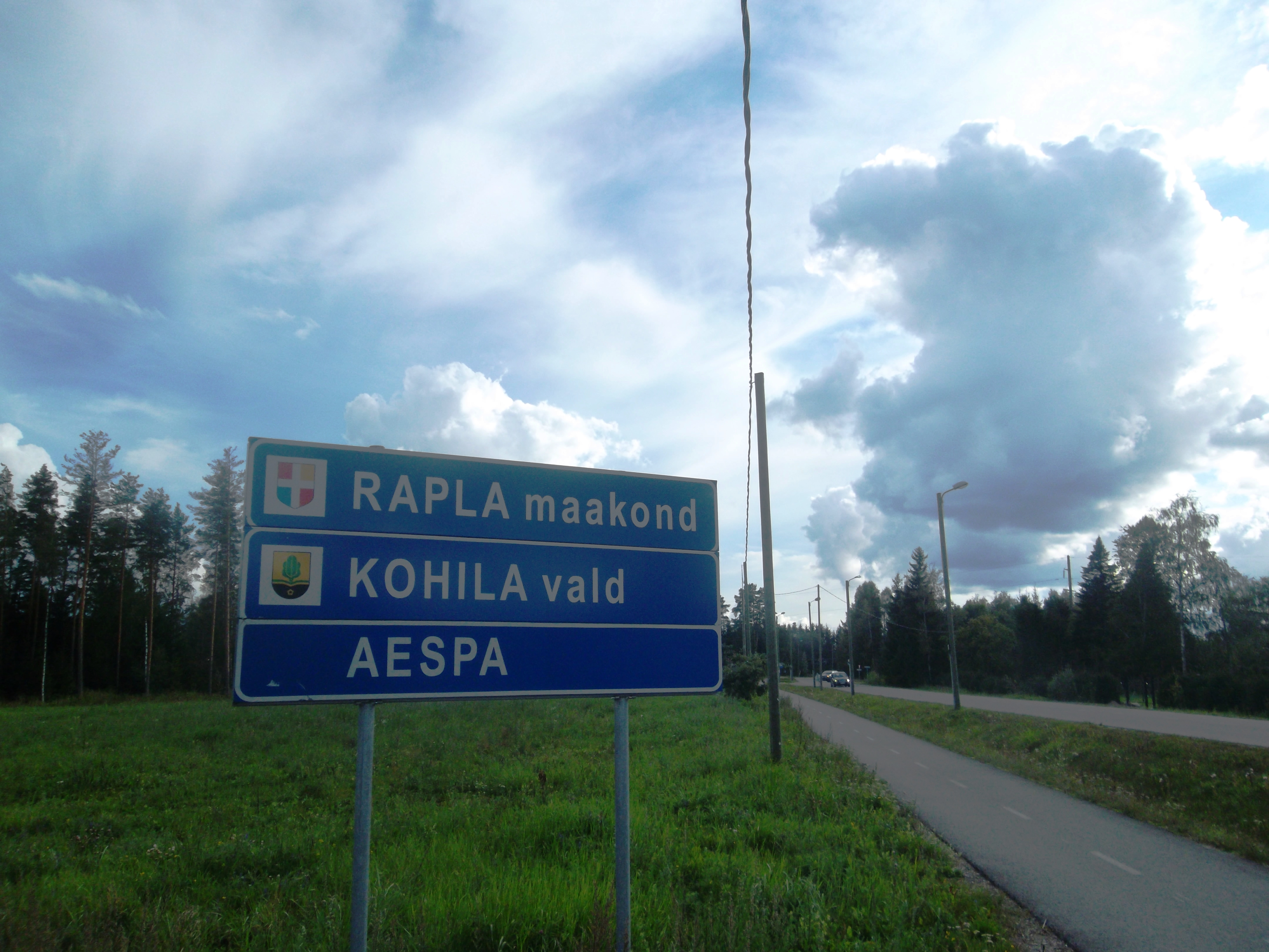 Аэспа.